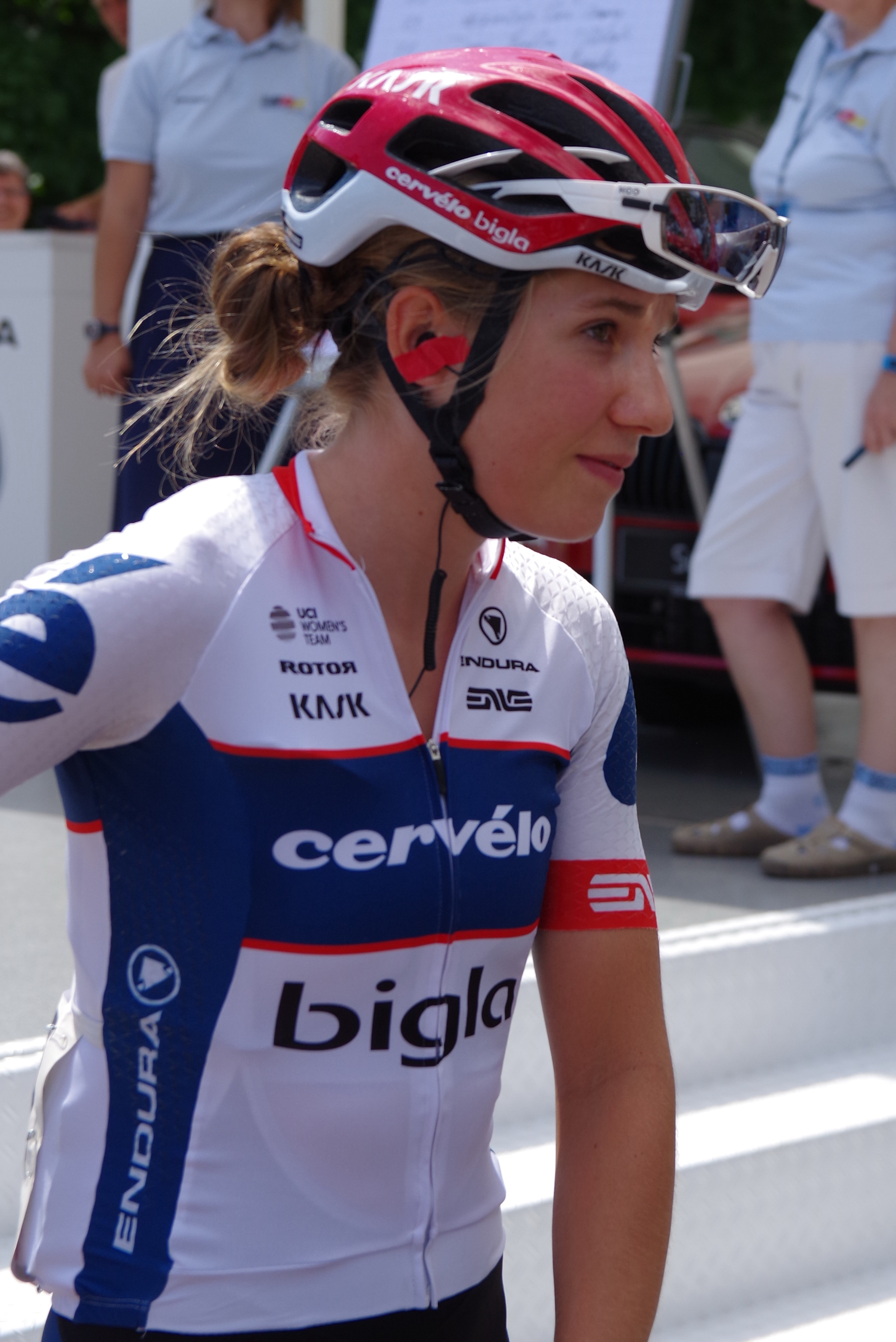 Deutsche Meisterschaften im Straßenrennen 2017 (Frauen) 24. Juni 2017 Einschreibkontrolle The making of this document was supported by the Community-Budget of Wikimedia Germany.